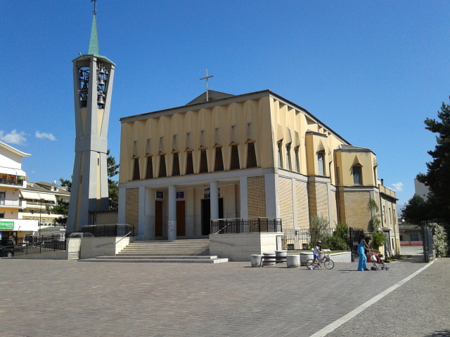 Piazzale di Santa Maria Goretti e la chiesa